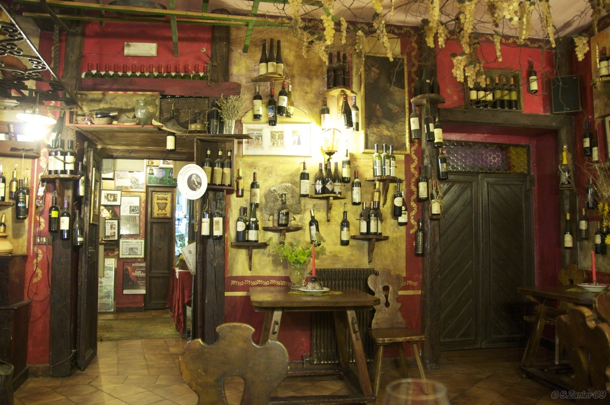 Interno Antica Trattoria "Al Borgàt"